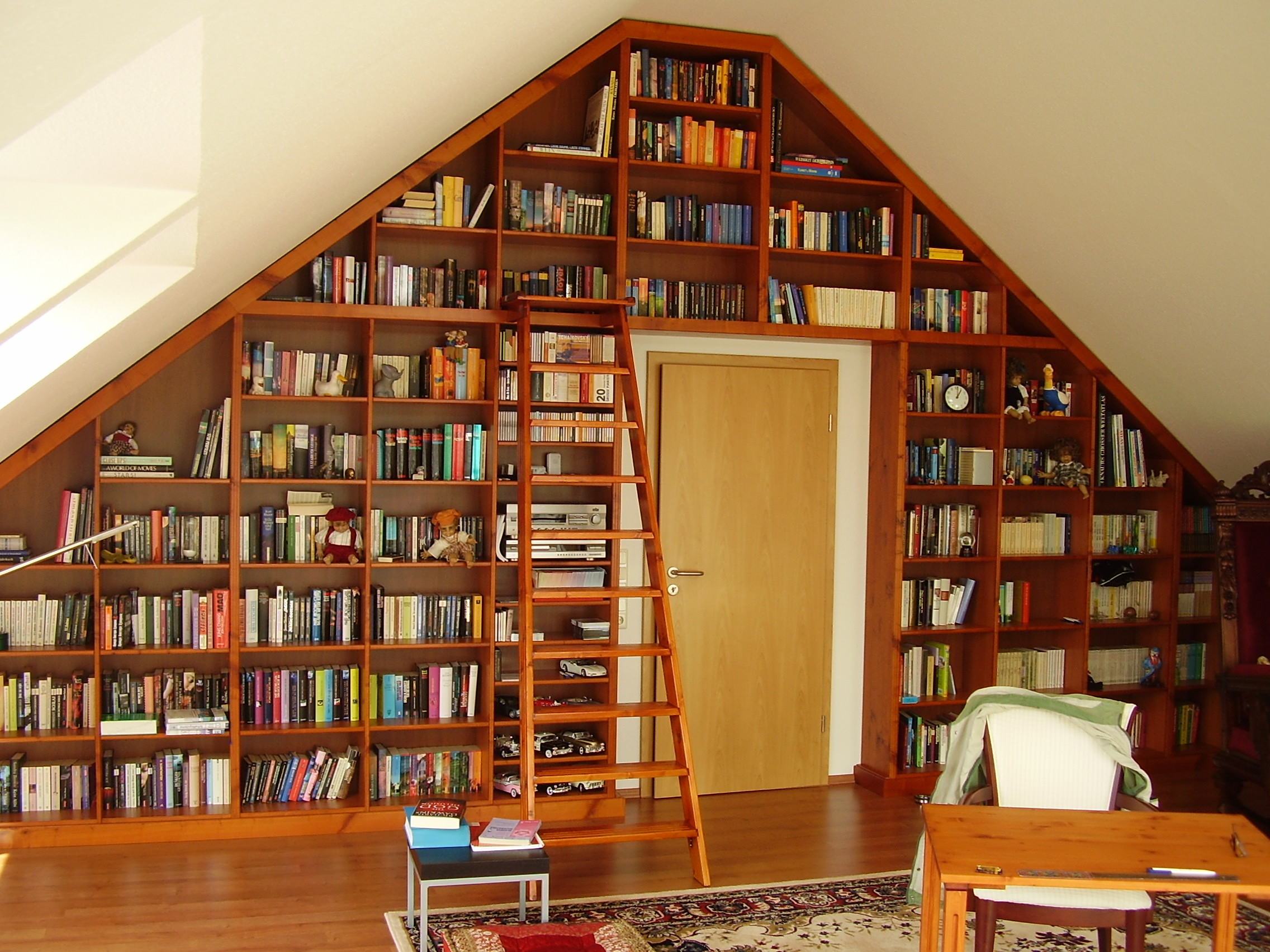 Sparrendach von innen